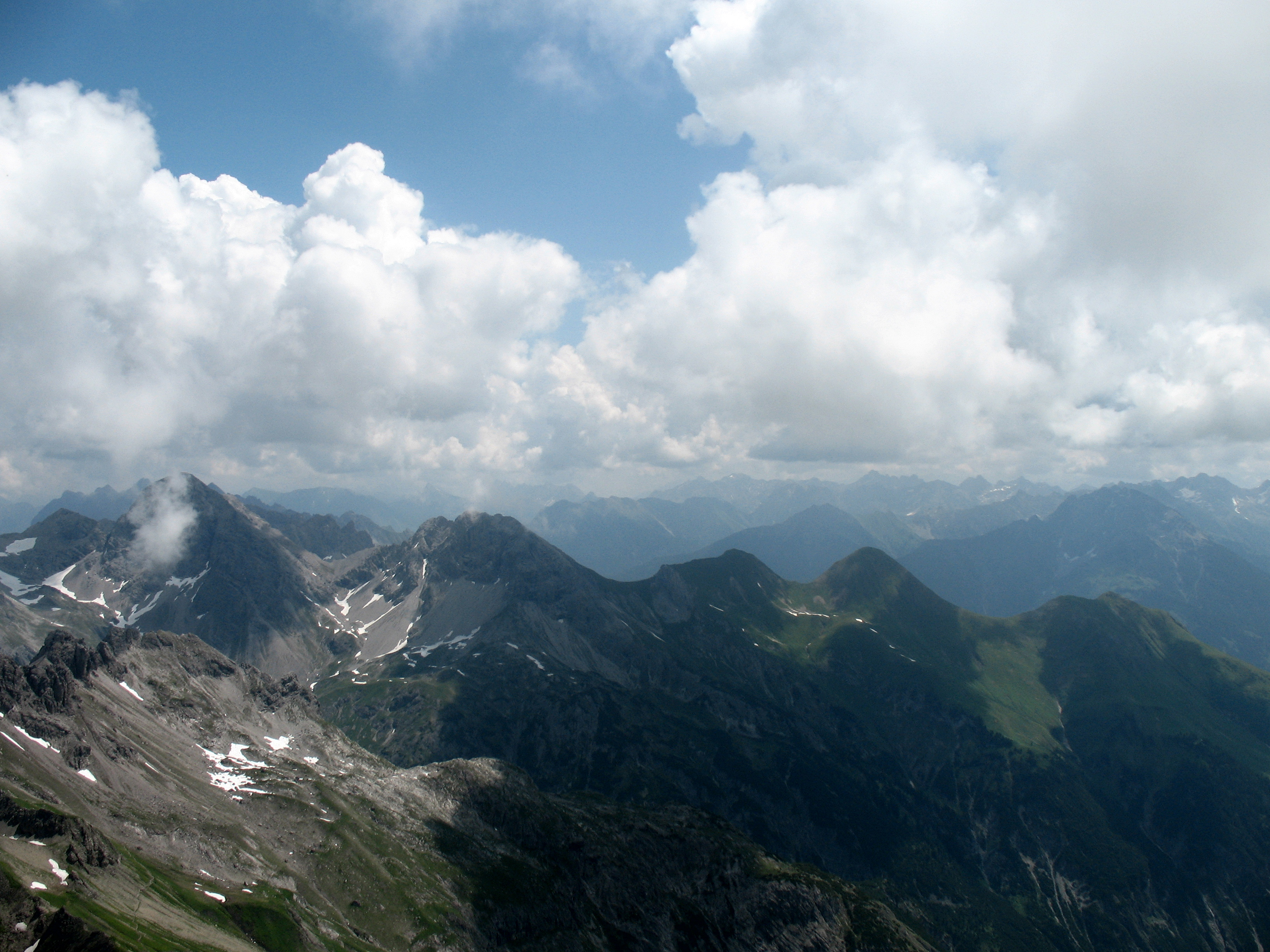 Blick von der Mädelegabel (2645 m) über die Südflanke des Kratzers (2428 m) auf den Gratverlauf vom Großen Krottenkopf (2656 m), über Ramstallspitze (2533 m), Strahlkopf (2388 m), Rothornspitze (2393 m) zur Jöchelspitze (2226 m).